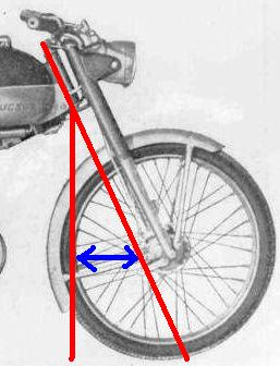 De balhoofdhoek is de hoek die de voorvork van een motorfiets ten opzichte van het wegdek maakt.